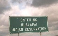 Entering Hualapai Indian Reservation